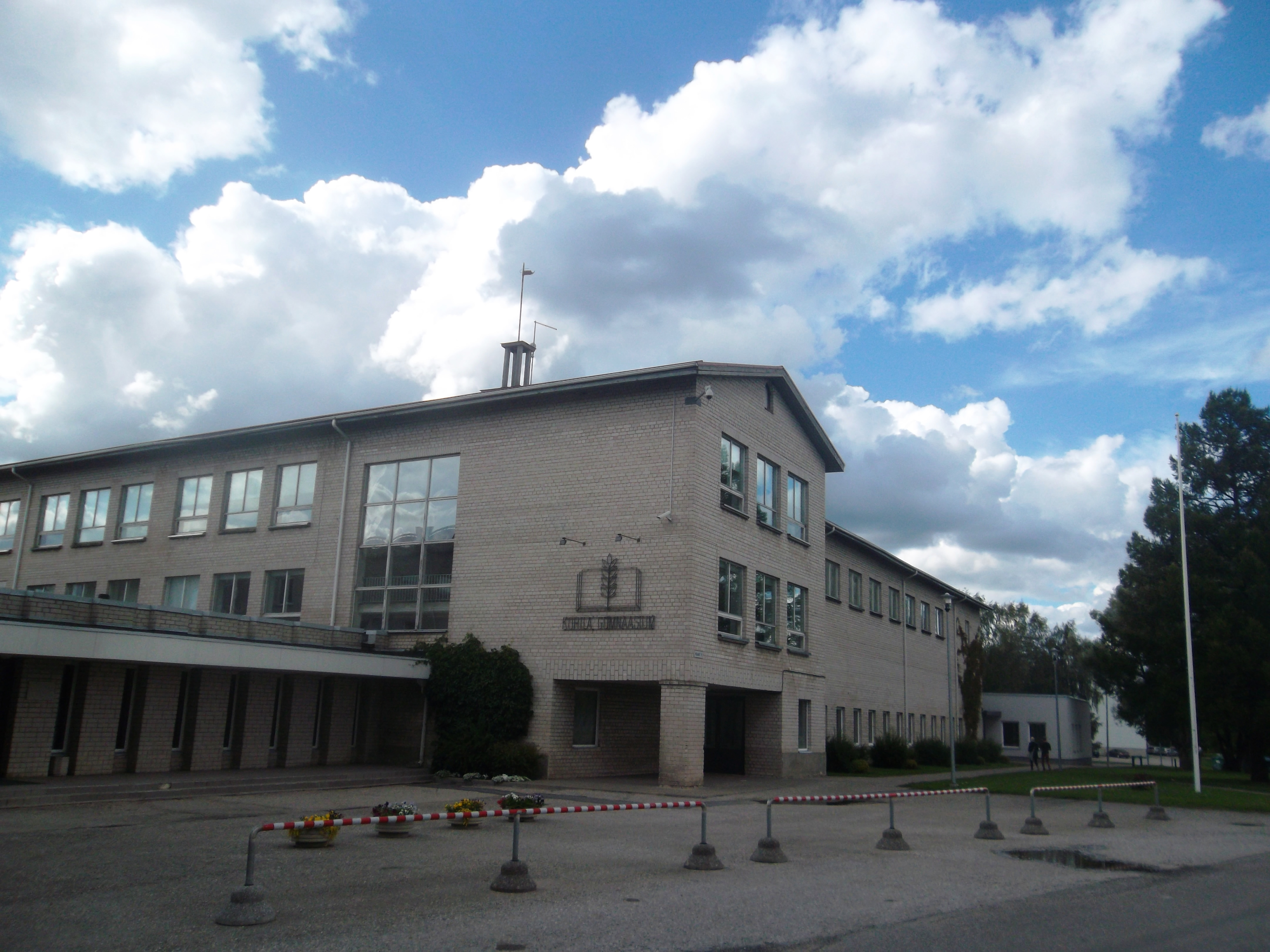 Кохилаская гимназия.